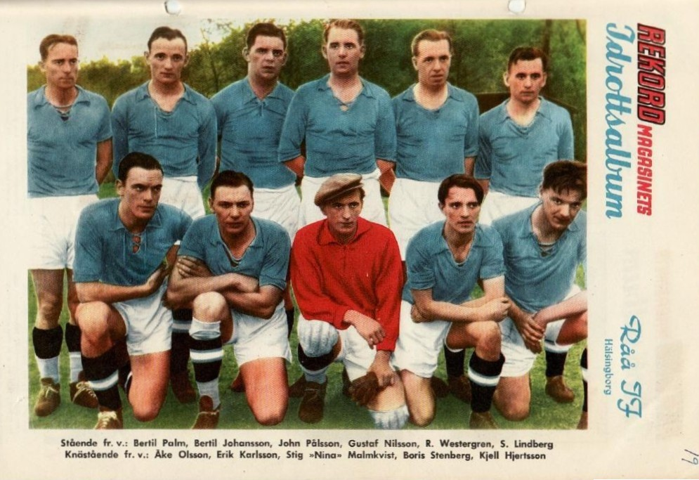 Råå IF under storhetstiden i Allsvenskan, säsongerna 1950-51 och 1951-52.